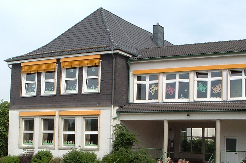 Schulgebäude